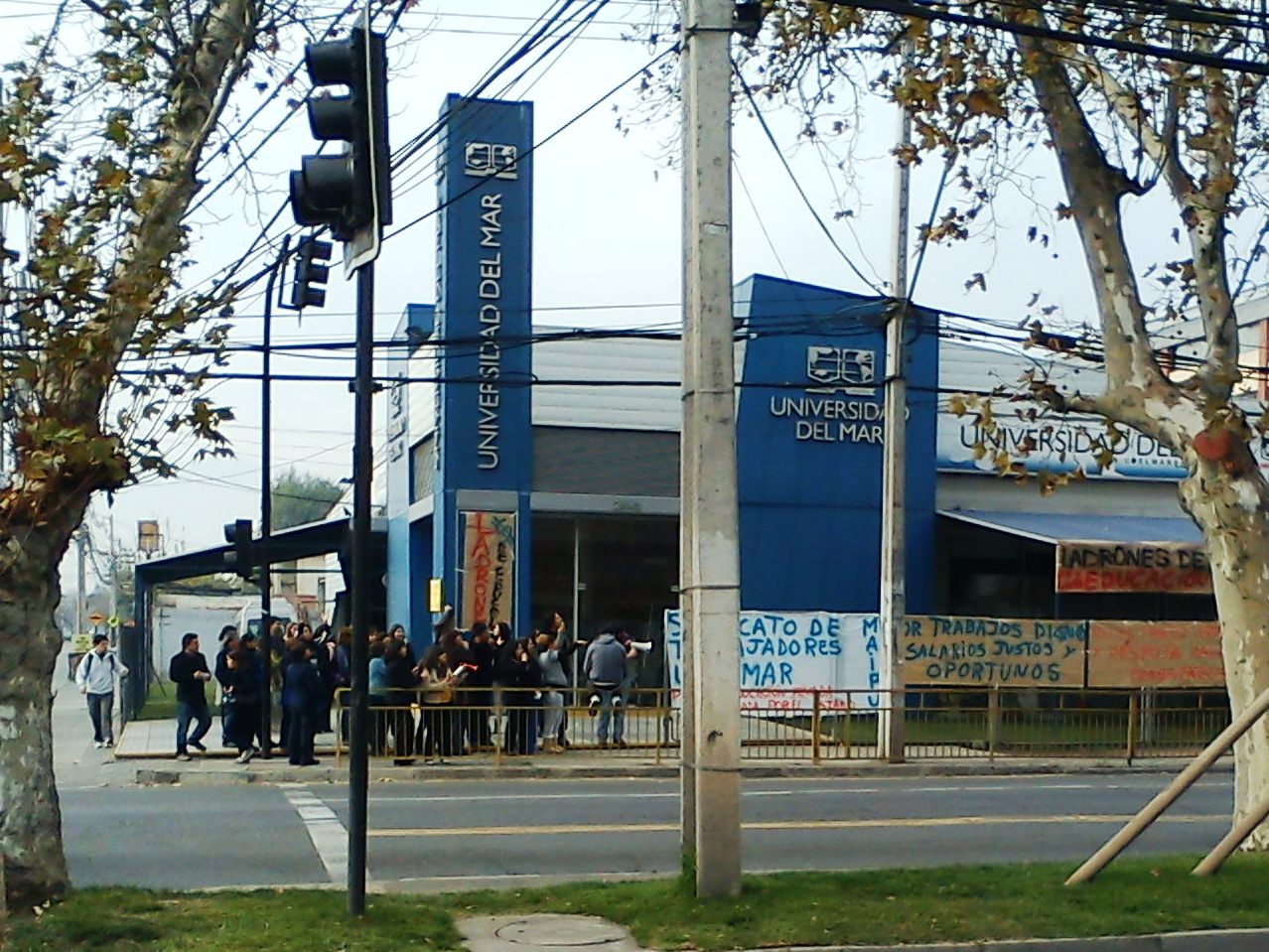 Imagen de las manifestaciones fuera de la Universidad del Mar a causa de controversias relacionadas a los fondos internos.